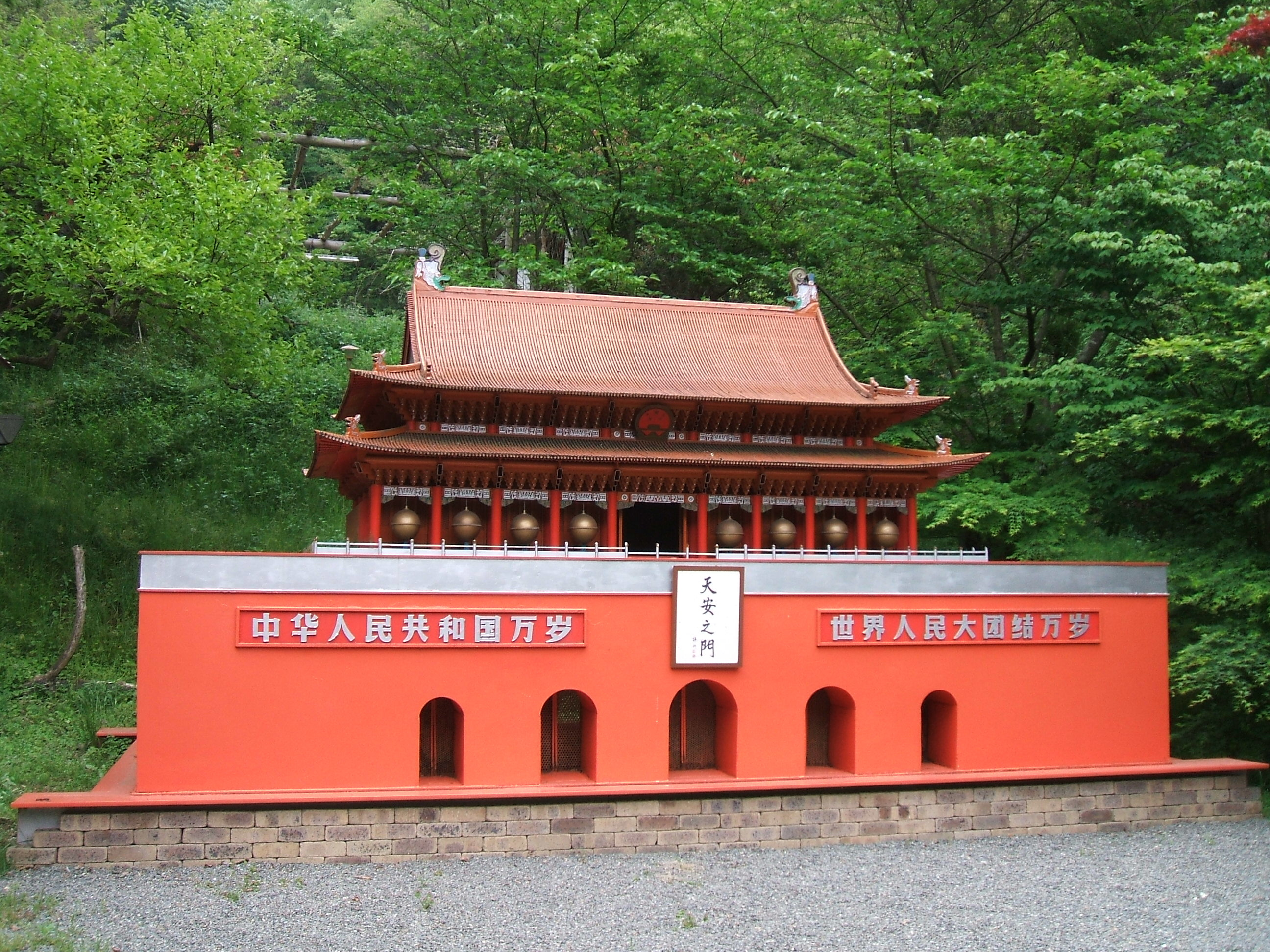 日本の広島県福山市にある中川美術館の敷地内にある、中華人民共和国北京市の天安門の10分の1のモニュメント（館長の許可を得て撮影）